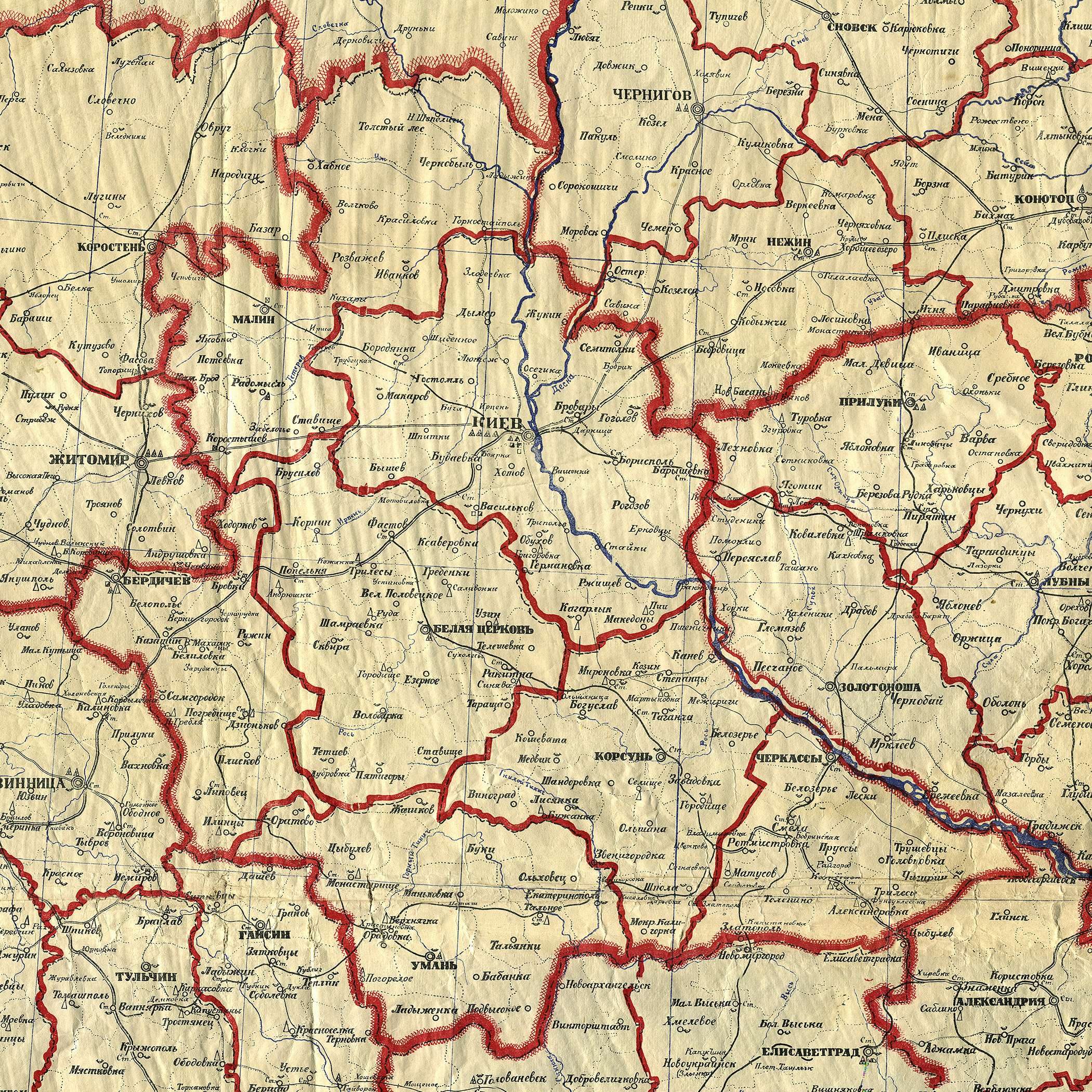 Київська губернія, фрагмент мапи Української соц. рад. республіки, адміністративний поділ після 12 квітня 1923 року